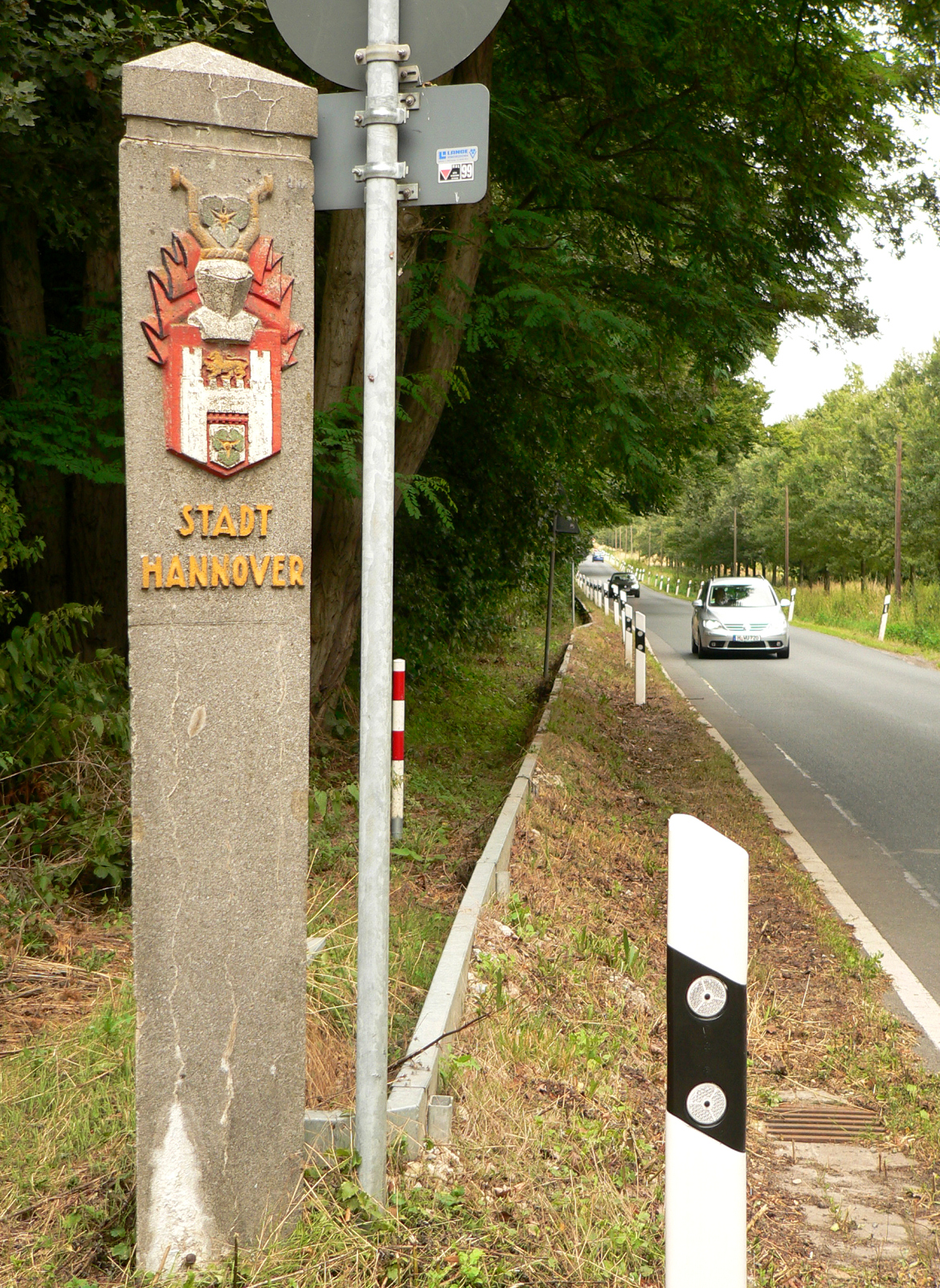 Grenzpfahl in Badenstedt, unterhalb Krötenwandersperre